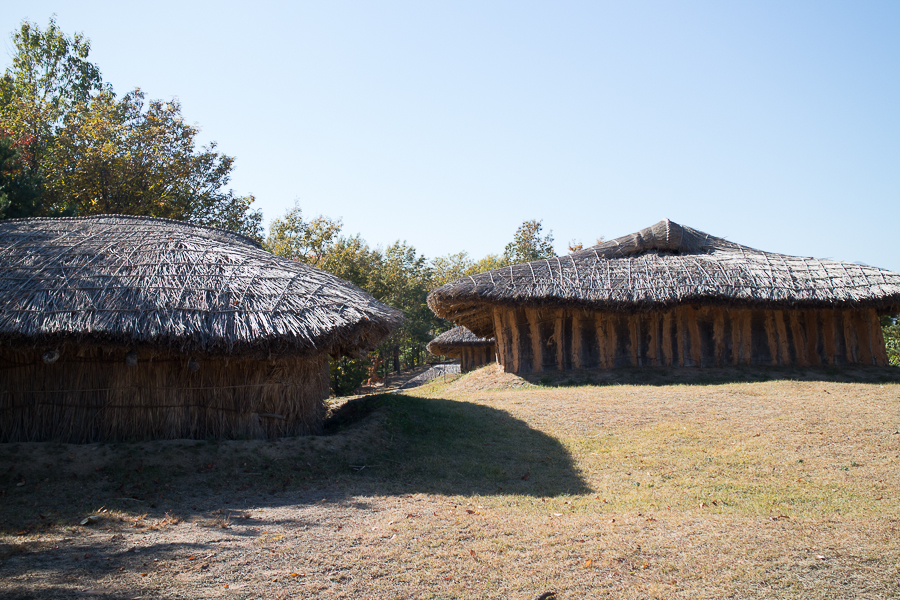 조양동 유적